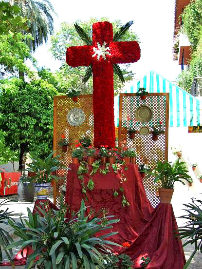 Cruz de mayo en la Plaza del Cardenal Toledo, en Córdoba (España).